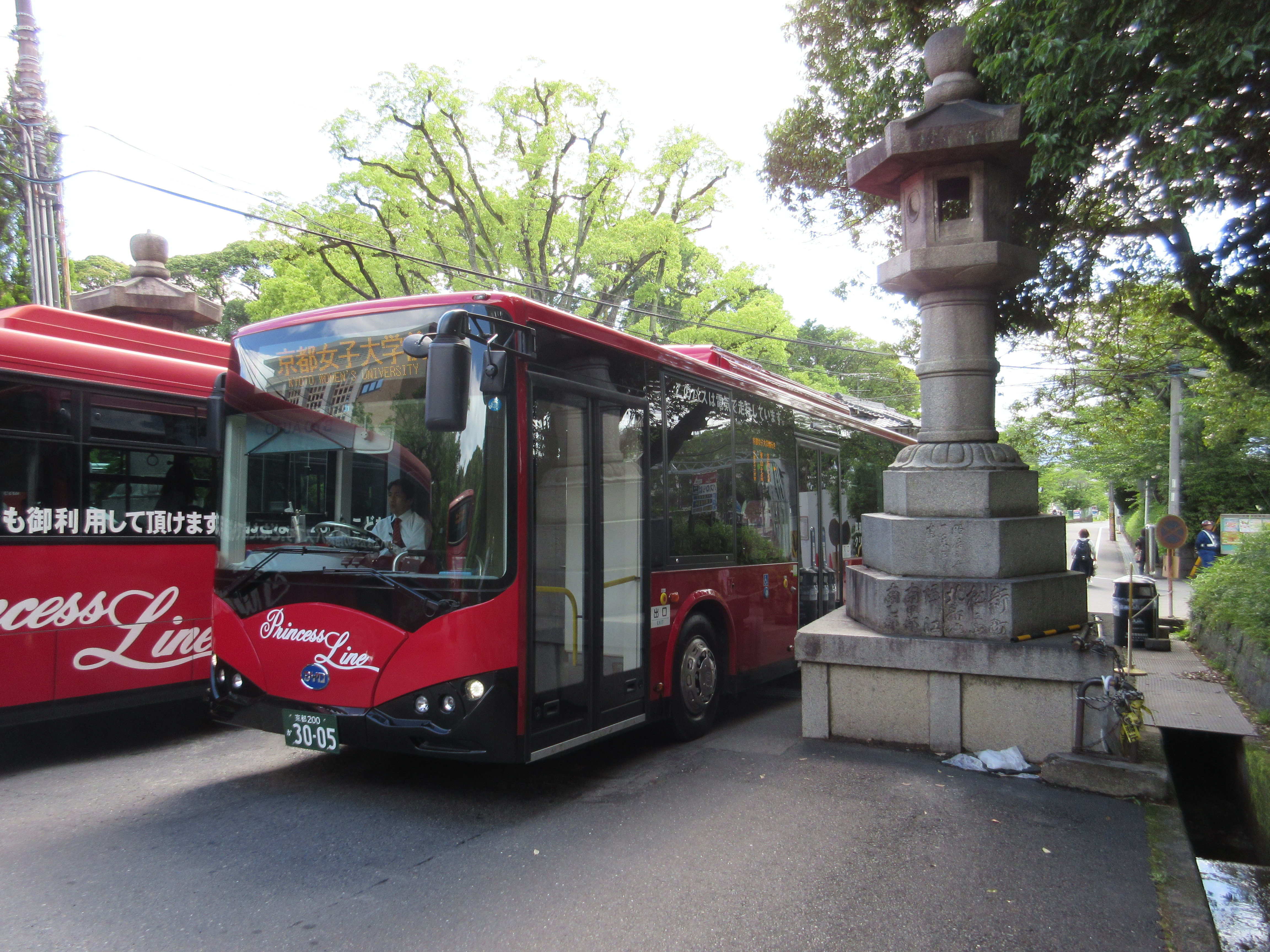 京都急行バスです。